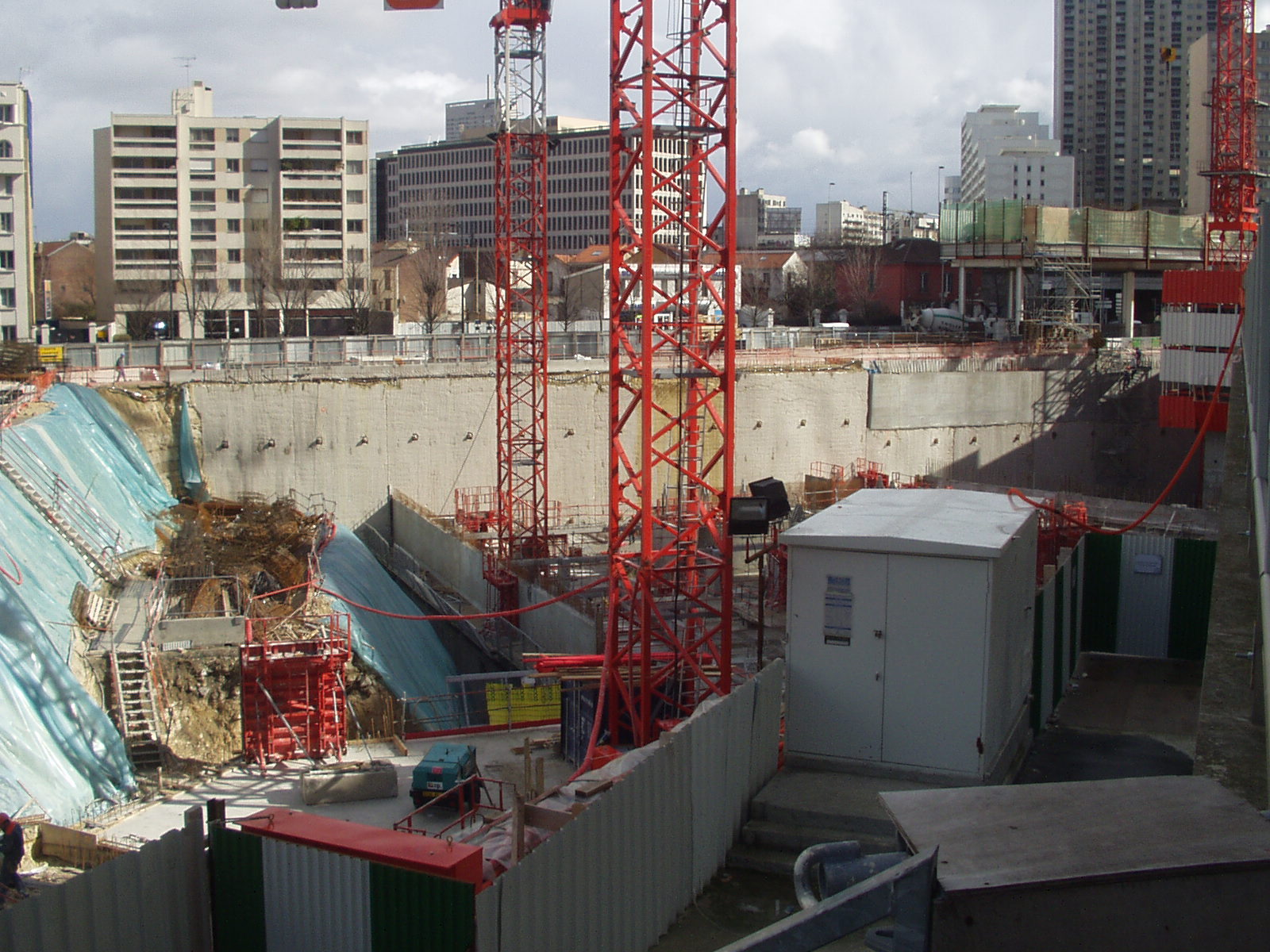 Courbevoie (Hauts-de-Seine, France) : Chantier de la Tour T1 à La Défense.